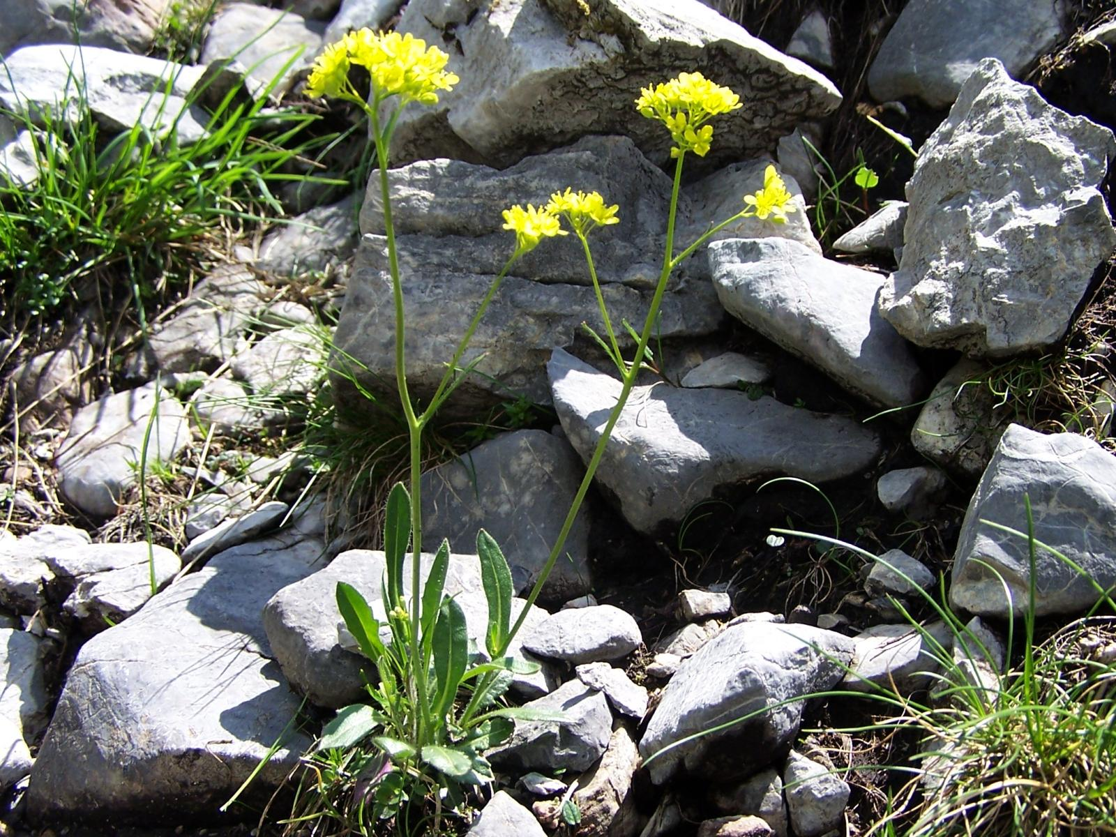 Biscutella laevigata (pl. Pleszczotka górska), habitat: Tatra Mountains, Dolina Miętusia, Kobylarzowy Żleb